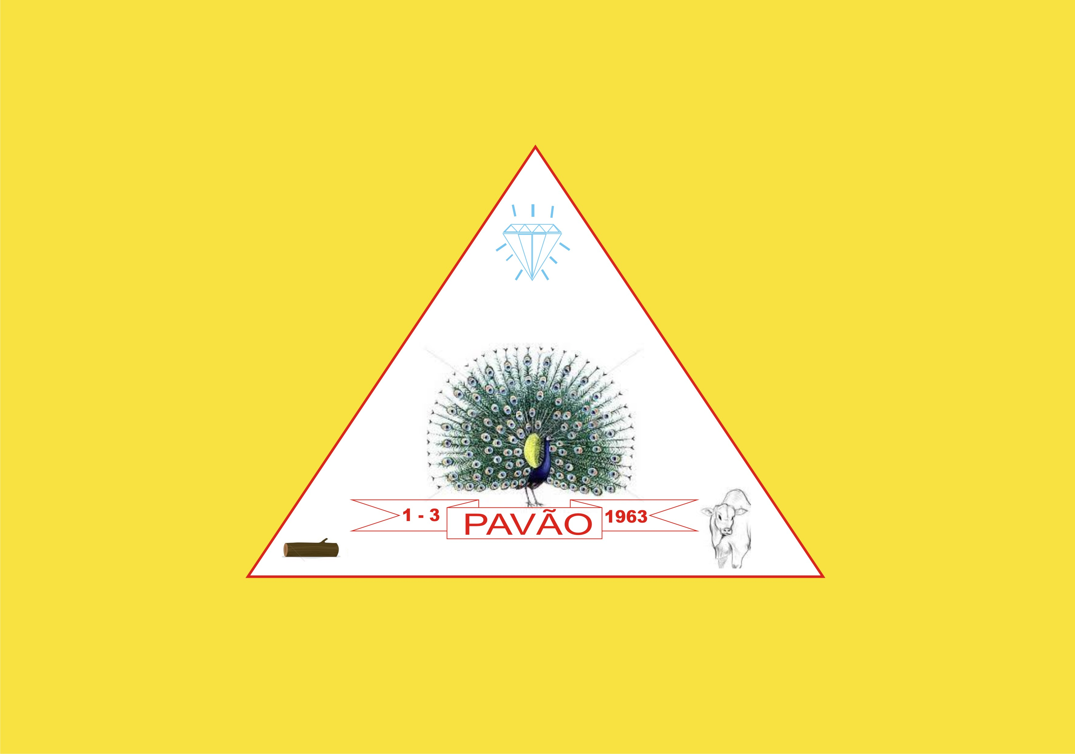 Bandeira do município de Pavão MG